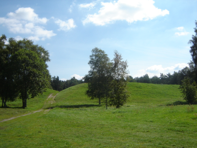 Vaade Kaarma maalinna nõlvale